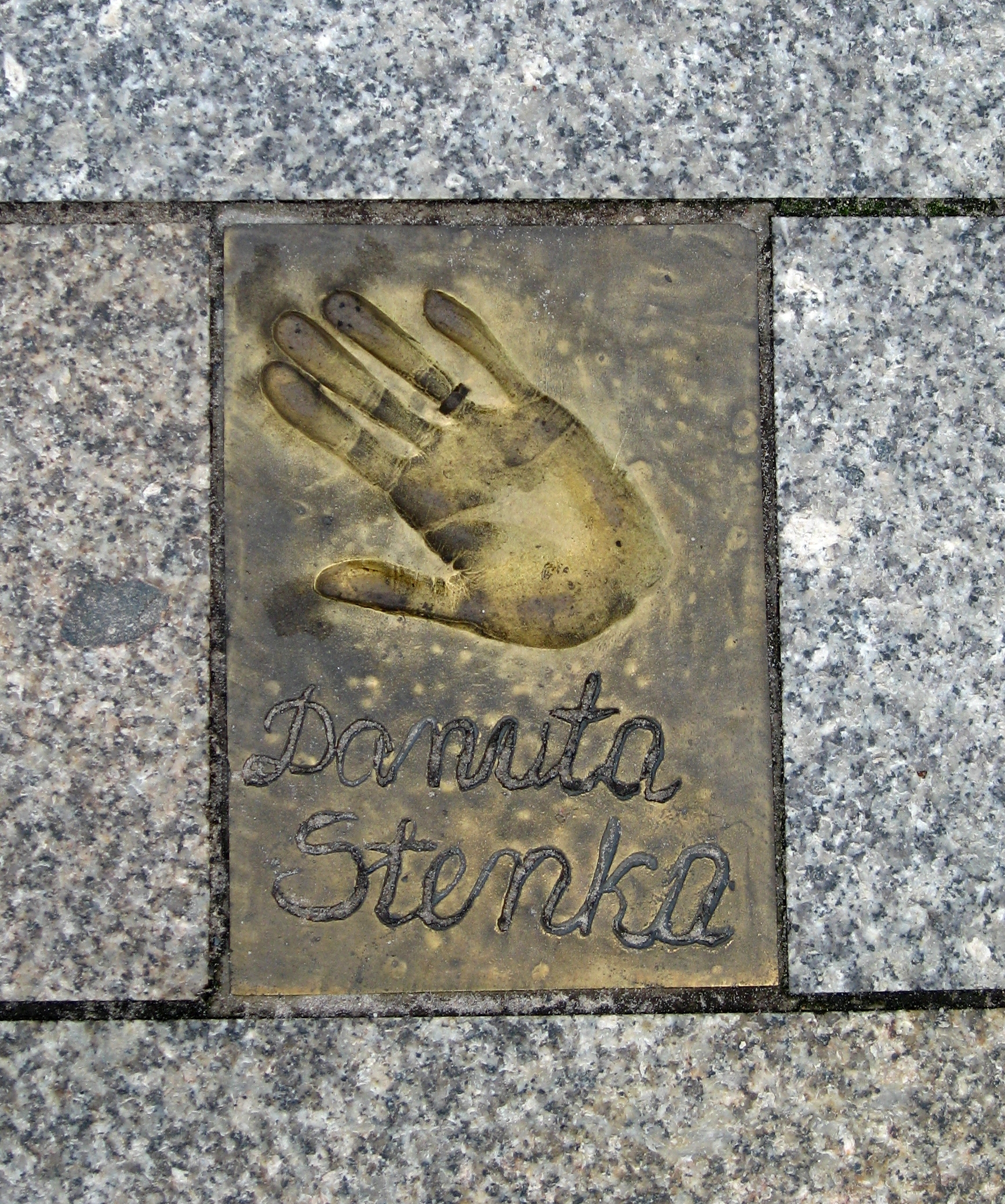 Aleja Gwiazd w Międzyzdojach - Danuta Stenka